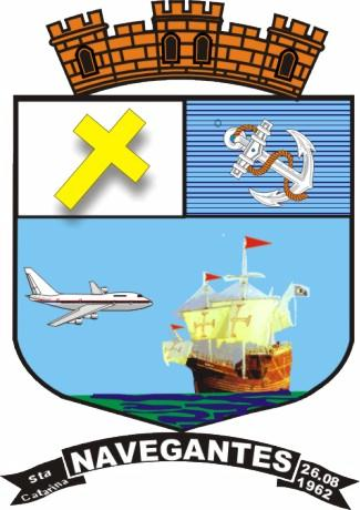 Blason de la municipalité de Navegantes - Brésil